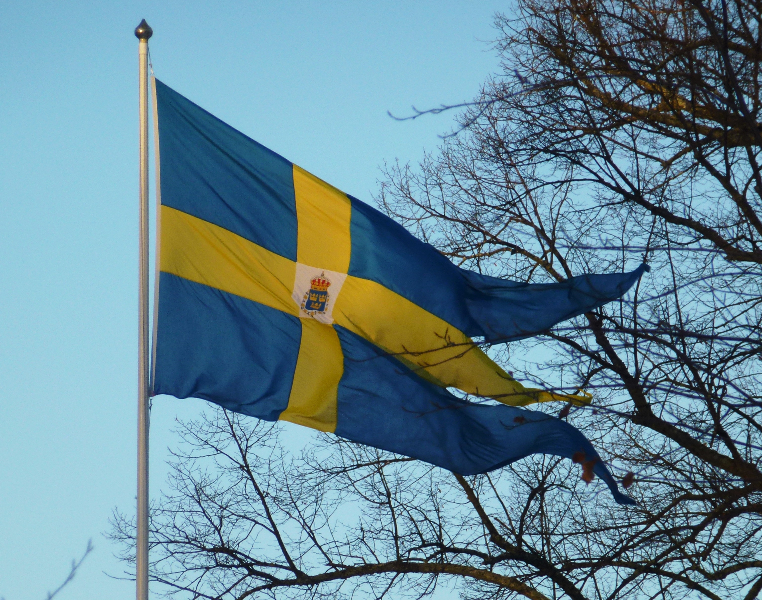 Kungliga flaggan Haga slott